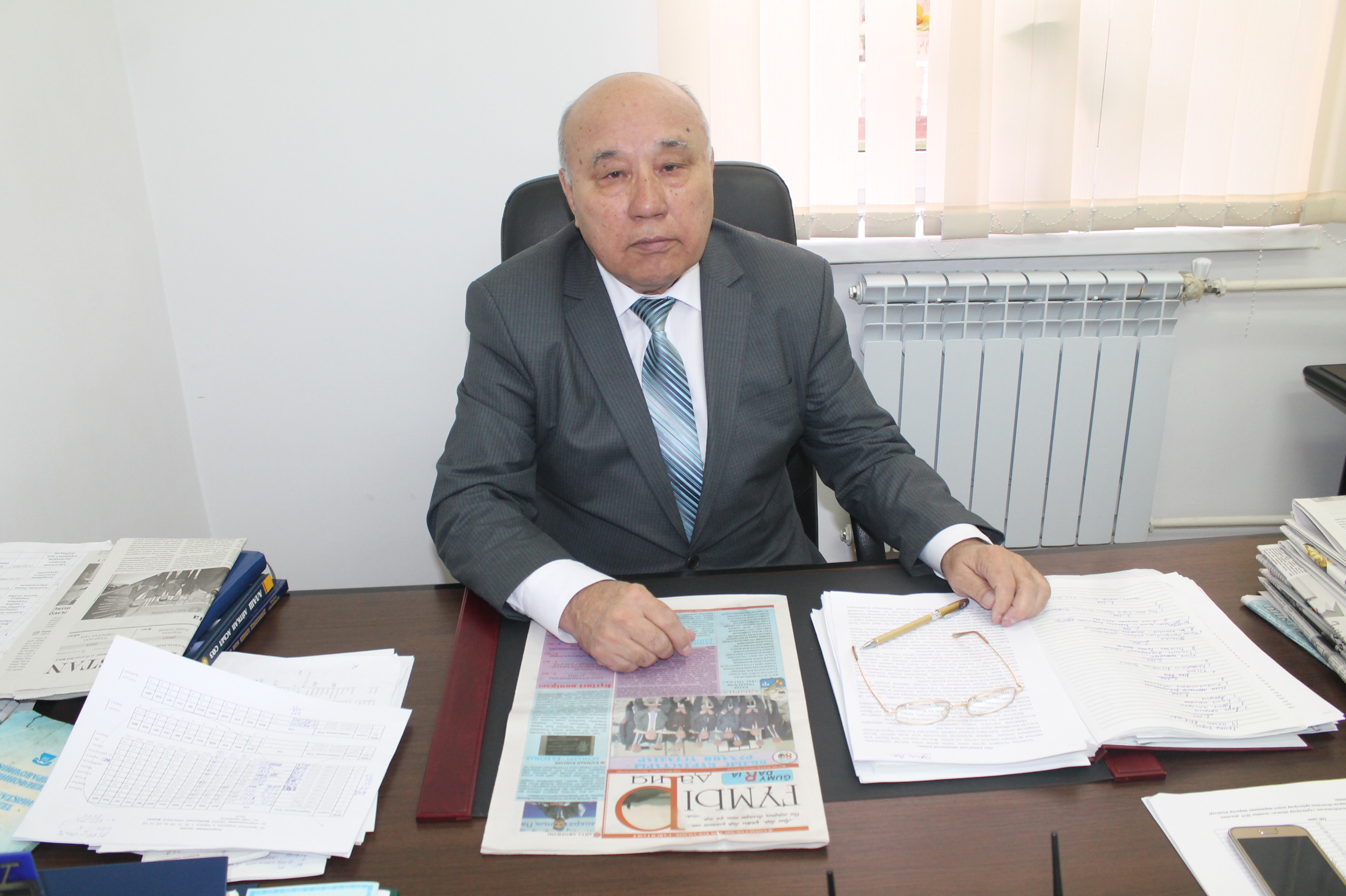 Қазақша (кирил): Жаңабай Миллионов "Ғұмыр-Дария" гезетінің редакциясында